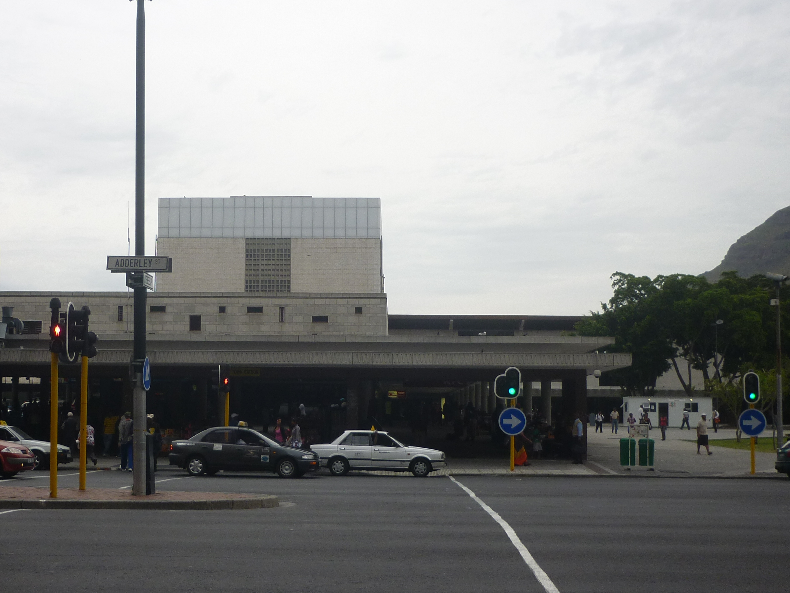 Bahnhof Kapstadt